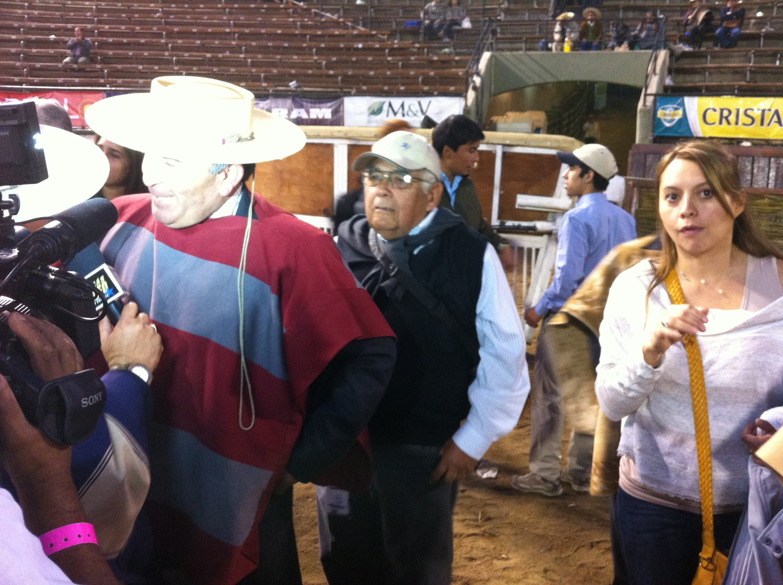 Vicecampeon 2013.